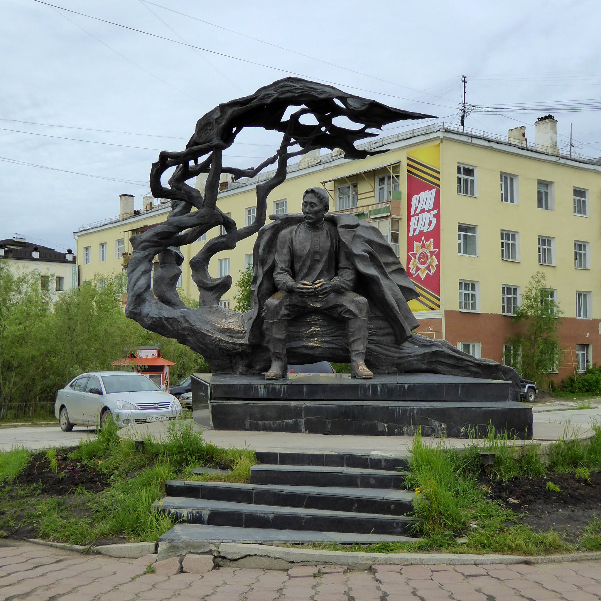 Памятник А.Е.Кулаковскому, Якутск